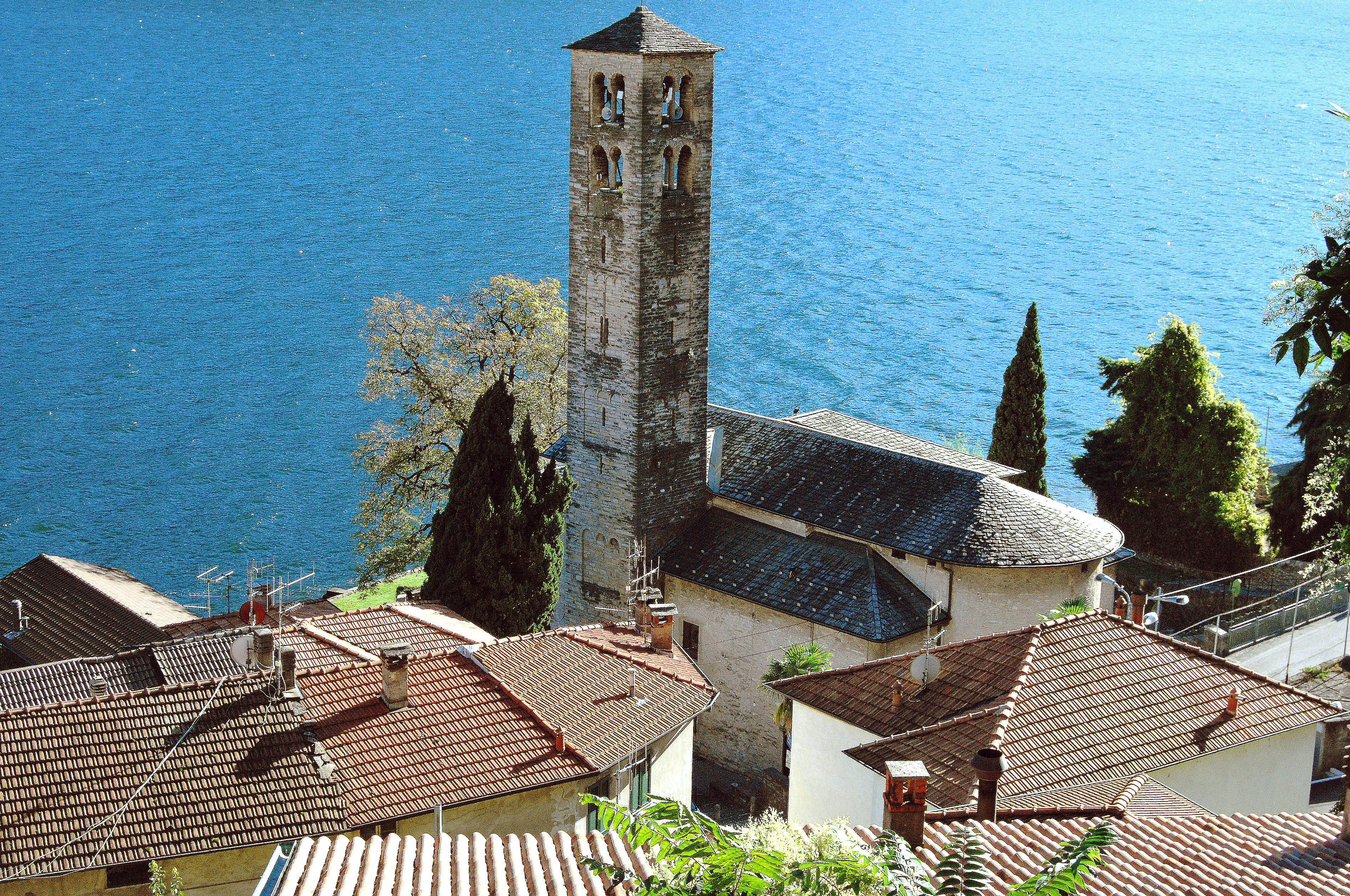 Carate Urio (Lago di Como). Panoramica con chiesa SS. Filippo e Giacomo.